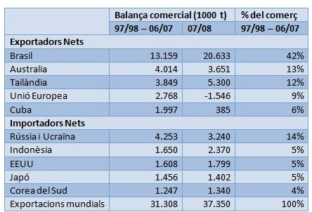 taula producció mundial